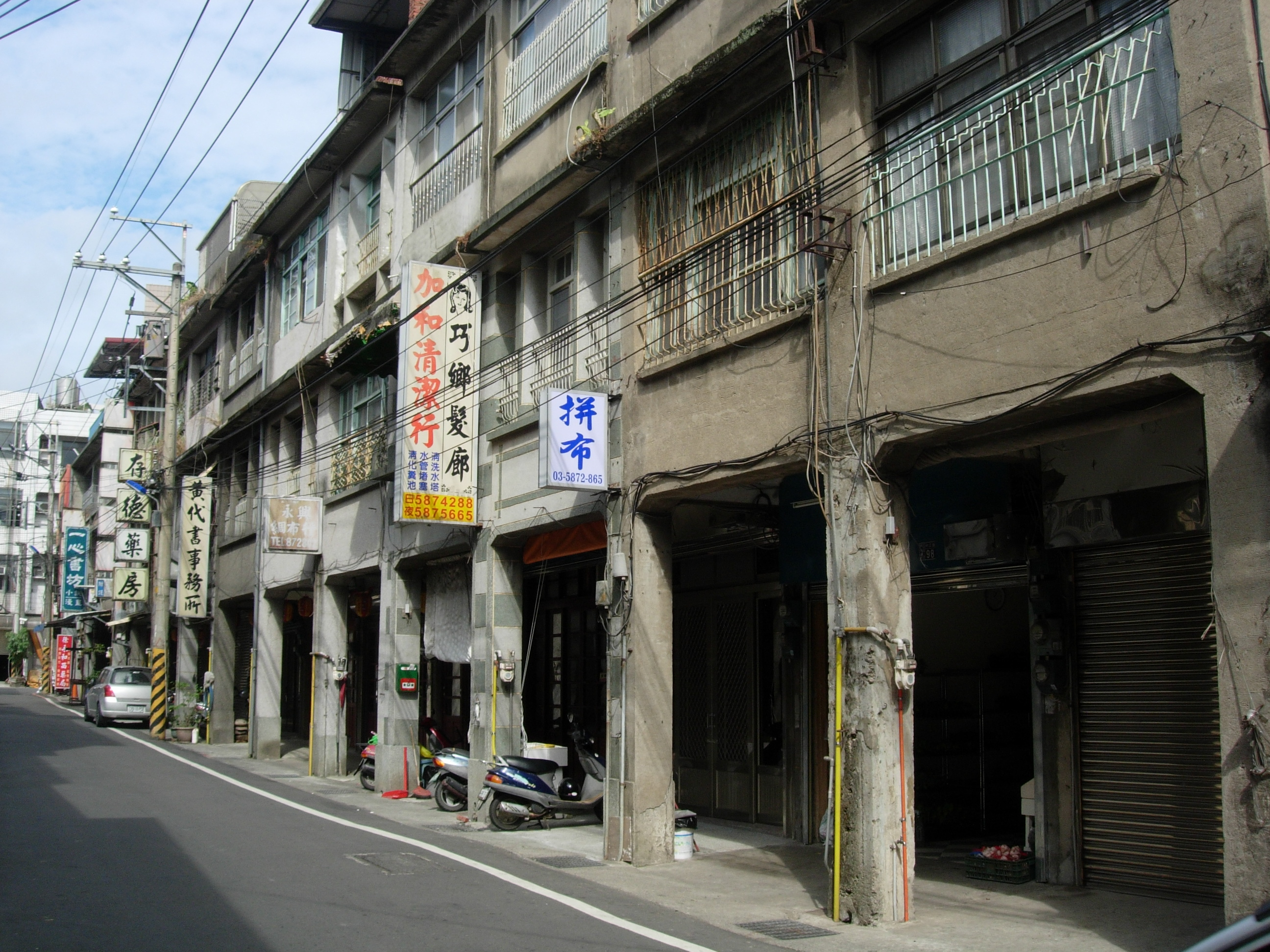 中文（台灣）: 關西鎮老街